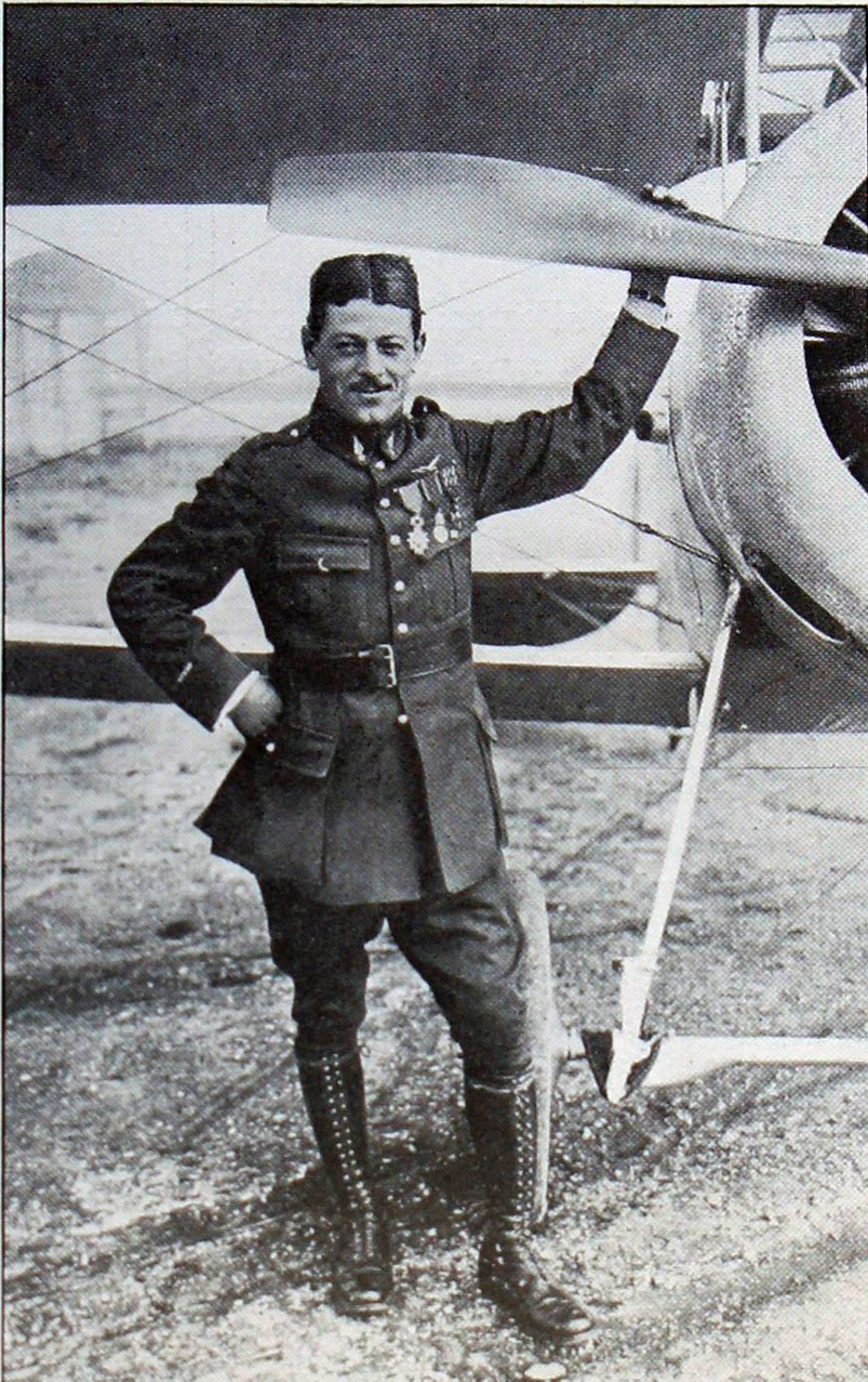 L'aviateur Maxime Lenoir présenté dans le journal L'Illustration.